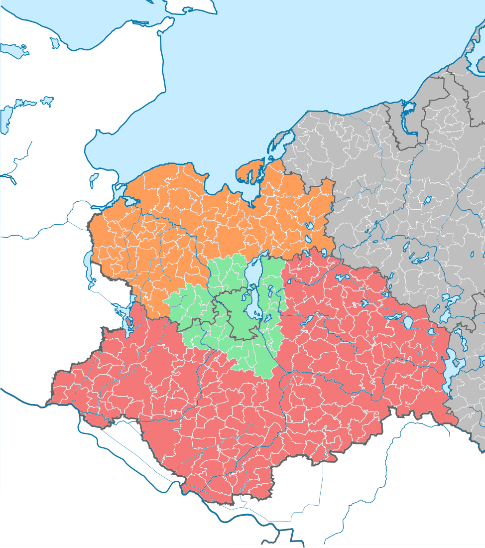 Karte der Amtsgerichtsbezirke im Landgerichtsbezirk Schwerin nach Umsetzung der Gerichtsstrukturreform zum 13. Juli 2015 Amtsgericht Schwerin Amtsgericht Ludwigslust Amtsgericht Wismar